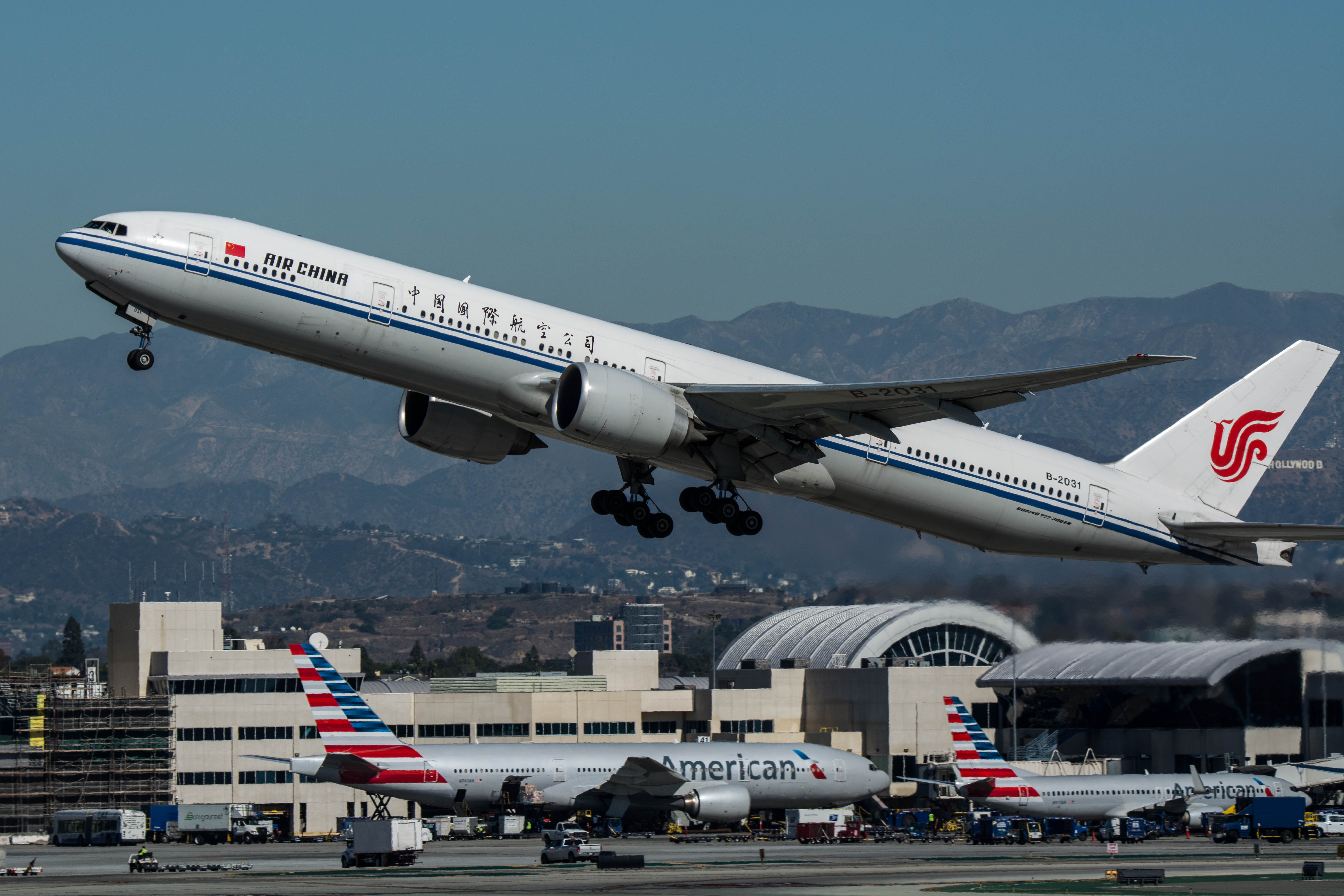 Air China Boeing 777 at LAX